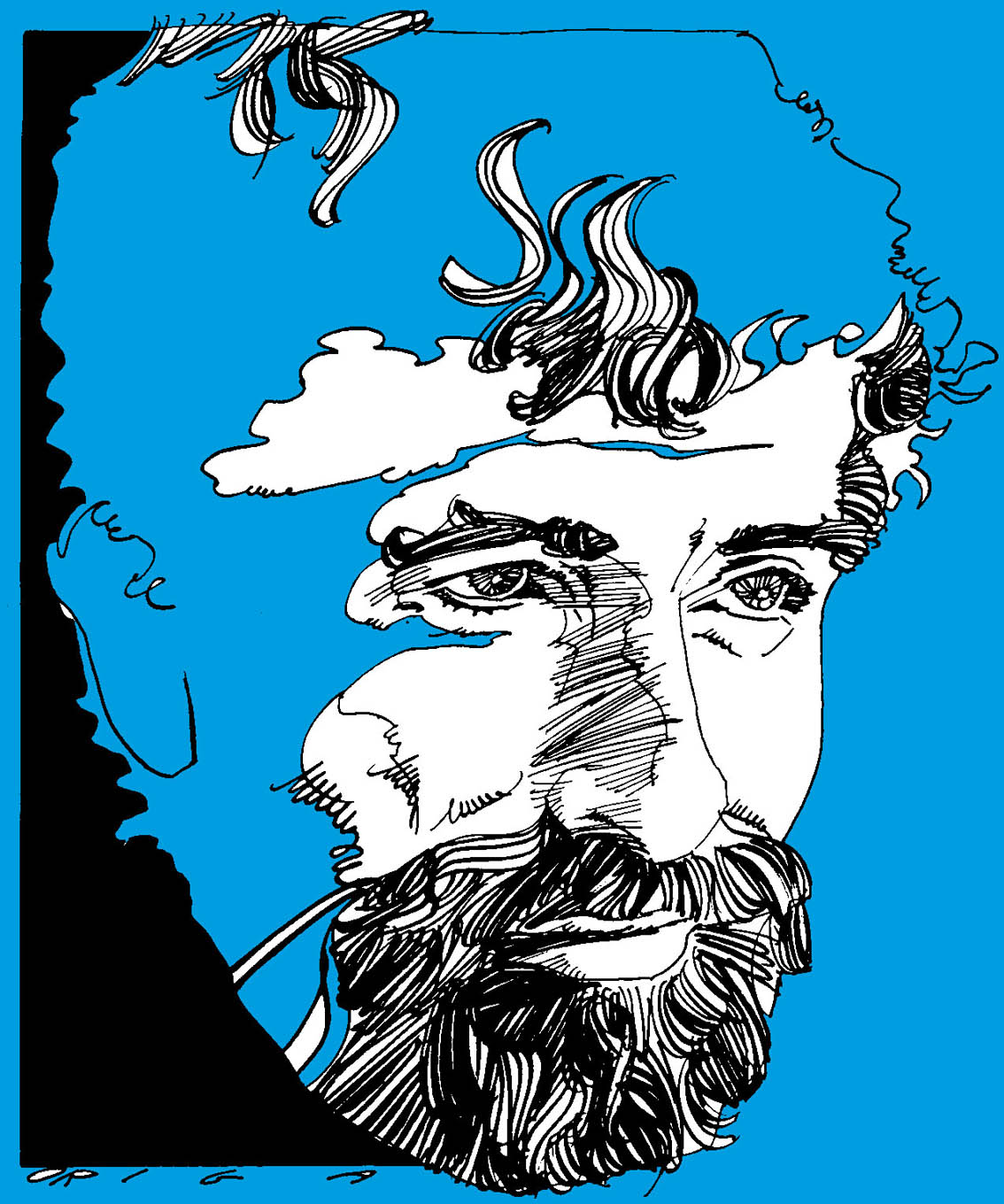 Guido Buzzelli, fumettista (1927-1992) in un ritratto di Graziano Origa